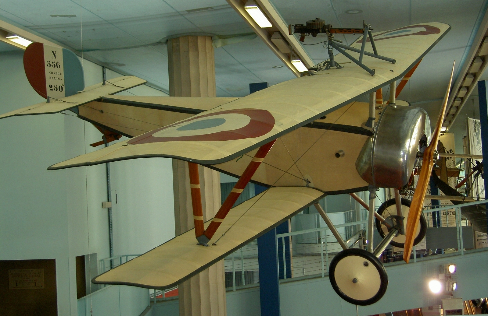 Nieuport XI "Bébé" (French plane, for military use)